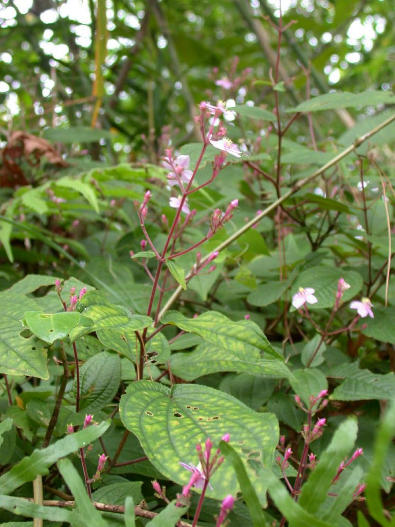 Bredia hirsuta：ハシカンボク 2004/08/11 沖縄本島：Okinawa Island, Japan